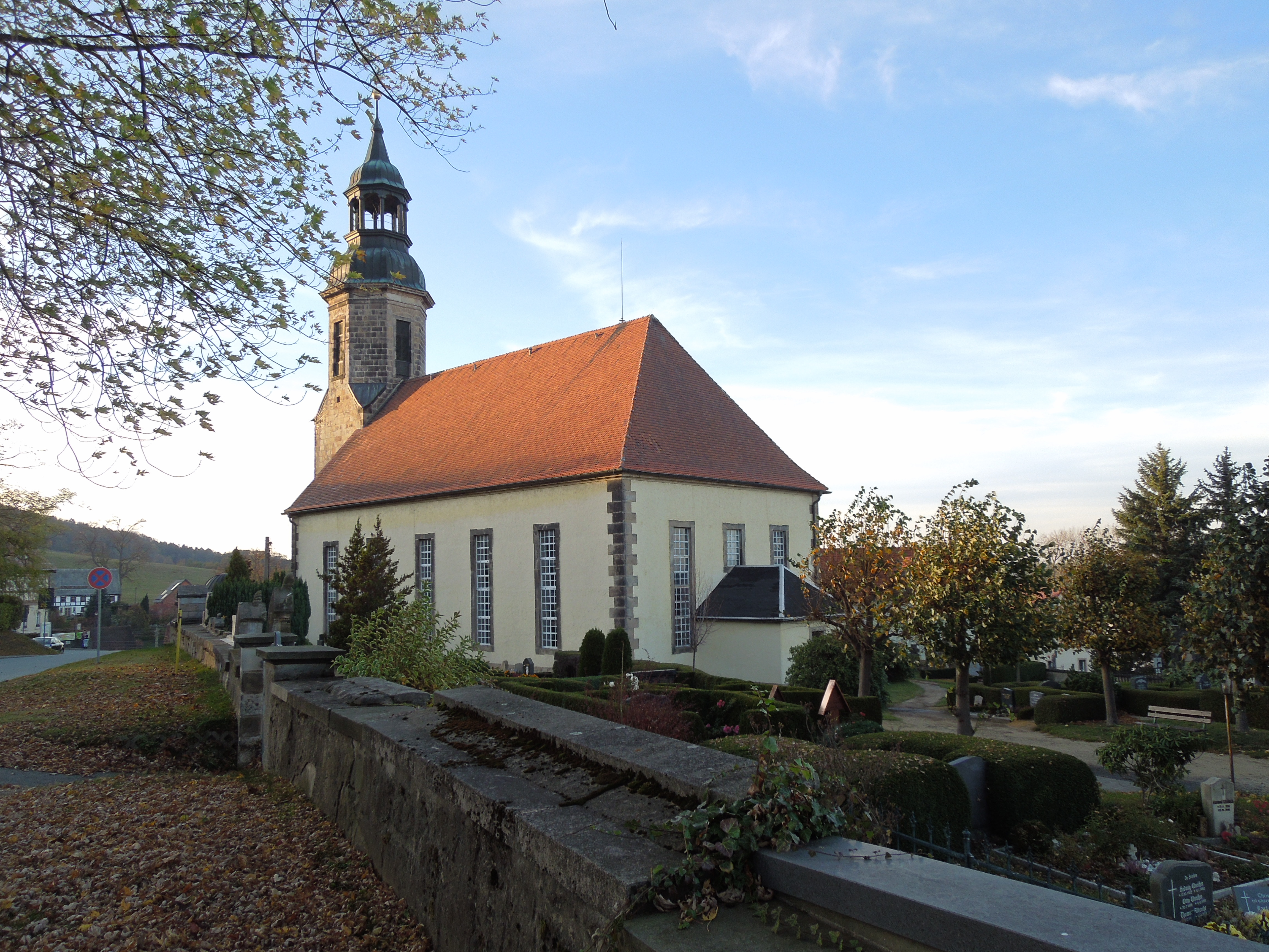 Blick von der August-Bebel-Straße zur Kirche in Waltersdorf